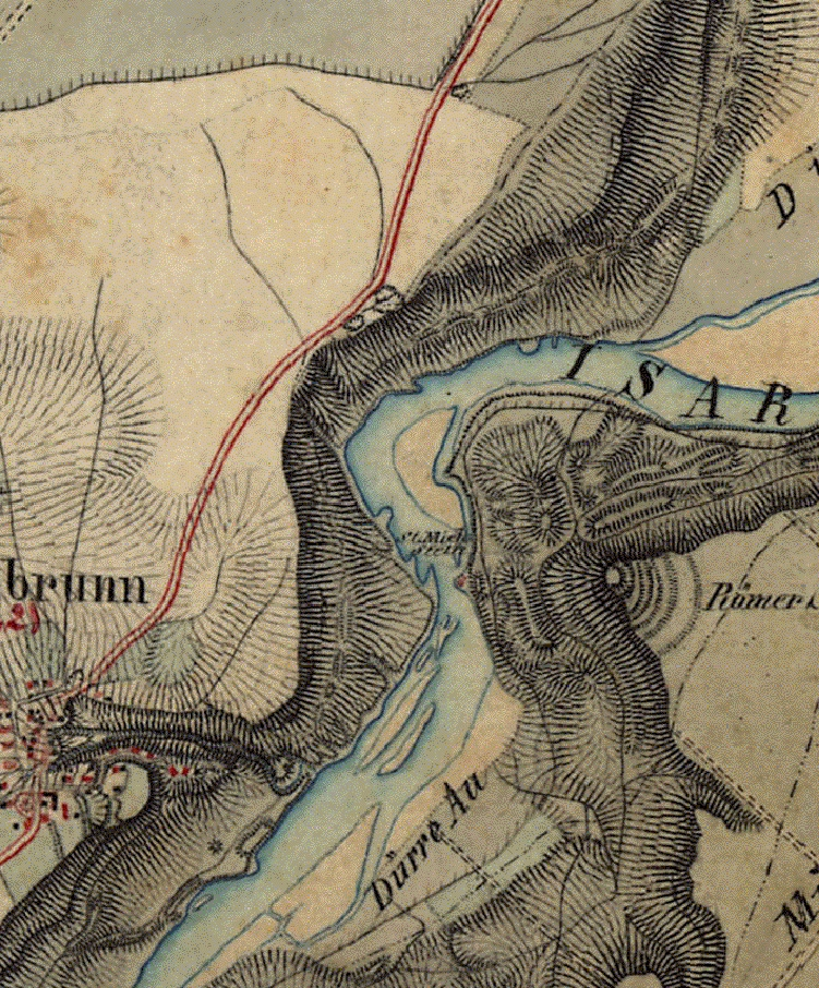 Historische Karte aus dem Gebiet um den Georgenstein (hier ist nur der Michaelstein als "St. Mich. Stein", rund 160 Meter unterhalb des größeren Georgensteins, eingezeichnet) bei Baierbrunn, Landkreis München, Bayern